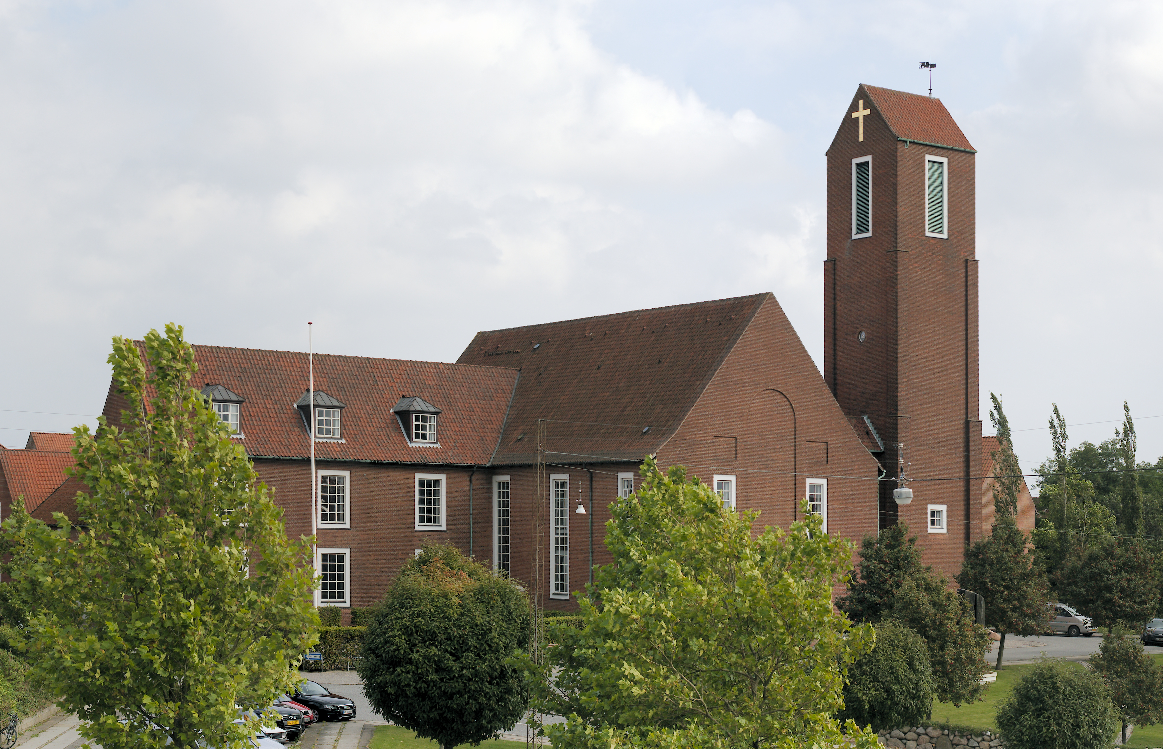 Sankt Markus Kirken (Aarhus)